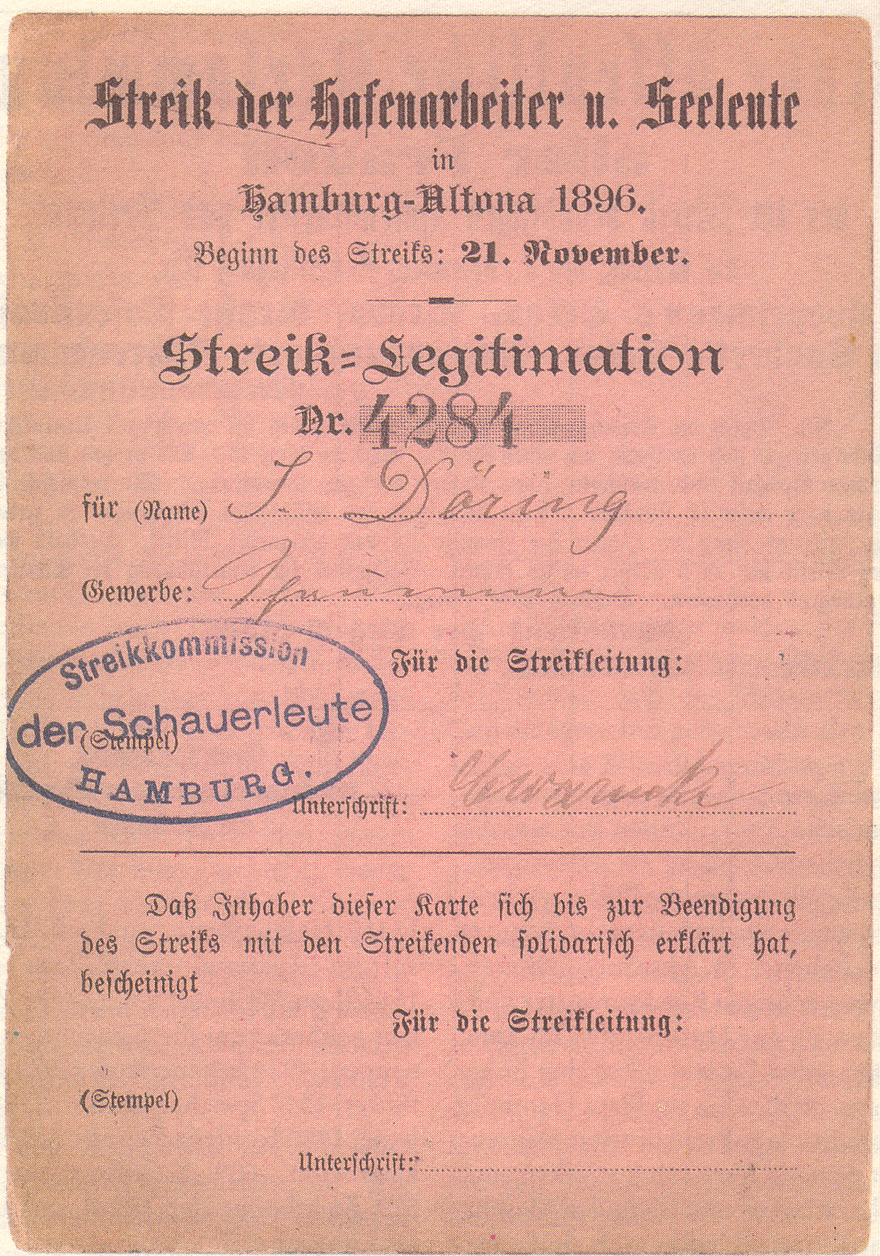 Streik der Hamburger Hafenarbeiter 1896/97, Streik-Legitimation, ausgestellt auf den Streikführer Johann Döring